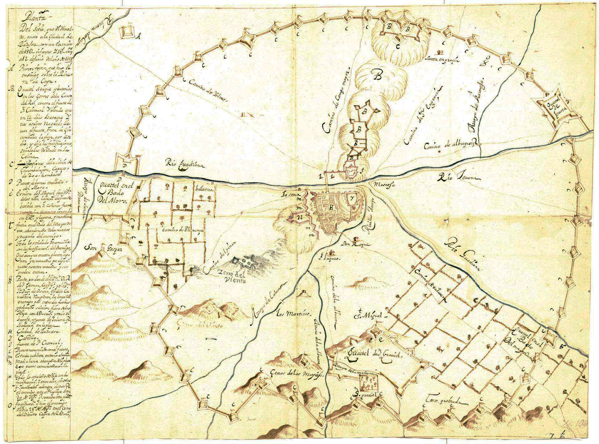 Mapa del sitio de Badajoz en 1658